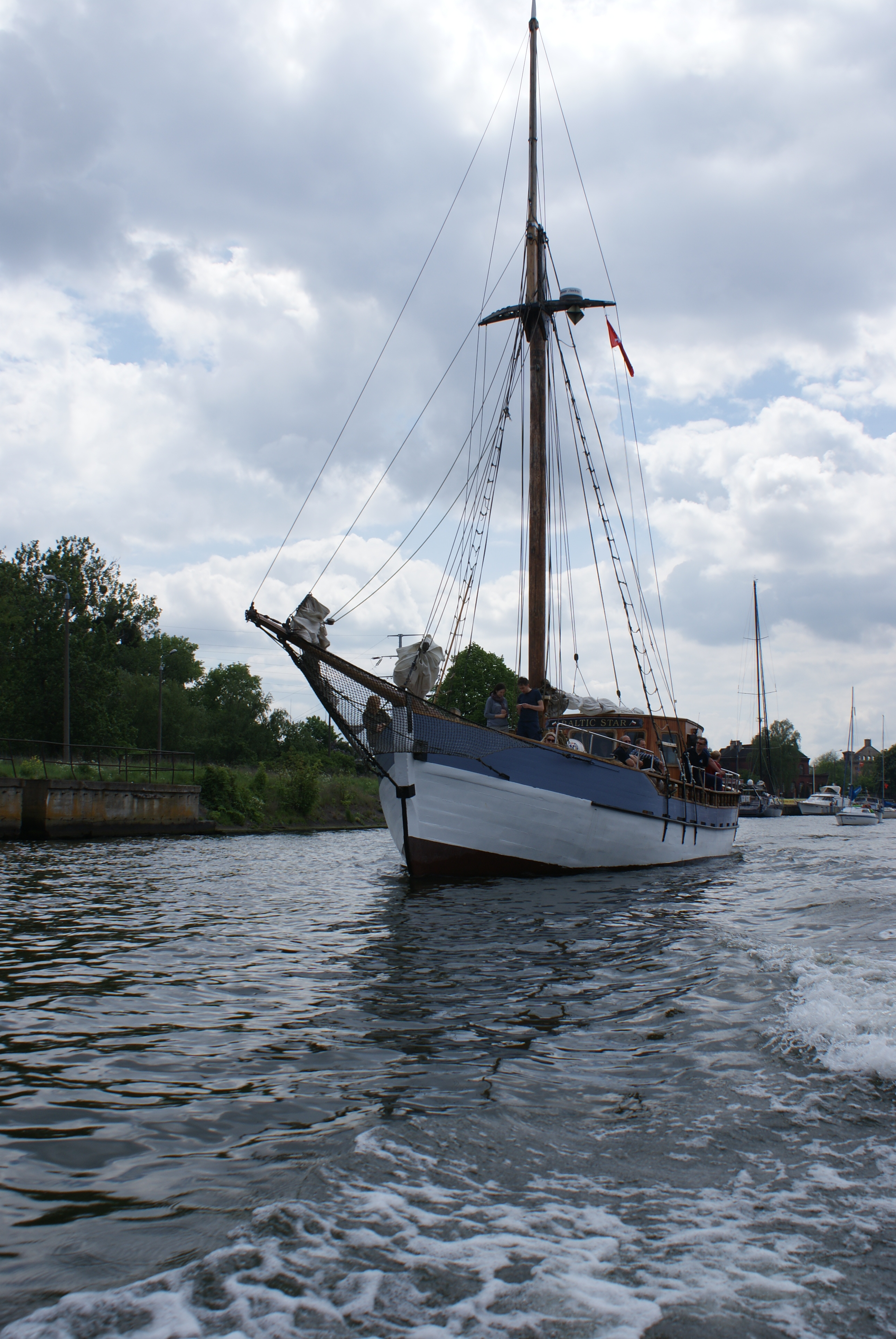 Otwarcie sezonu żeglarskiego w Gdańsku